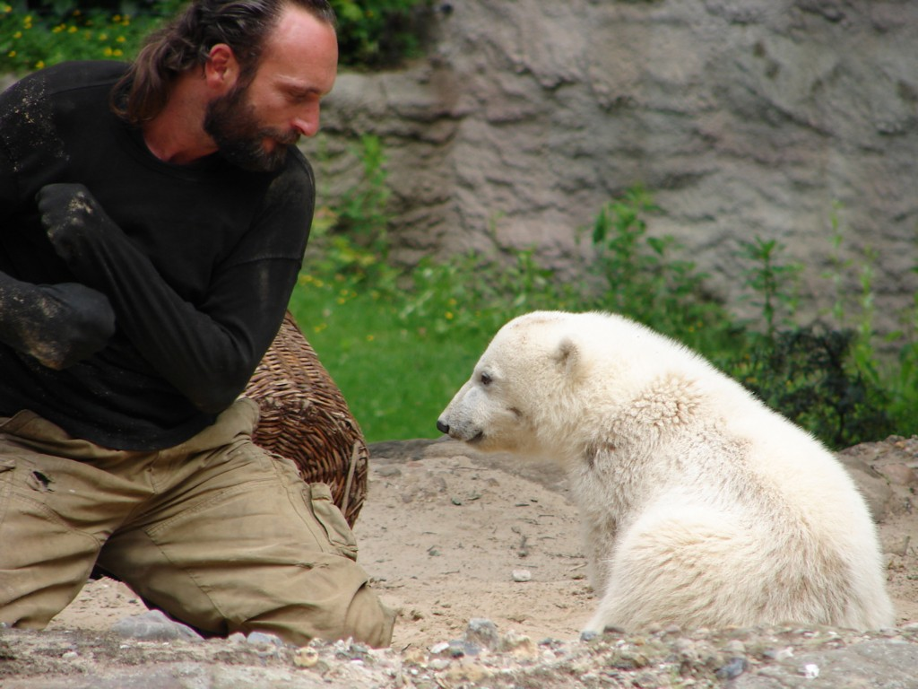 Eisbär Knut mit Pfleger Thomas Dörflein im Berliner Zoo am 31. Mai 2007